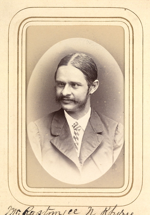 Rustomjee Naserwanjee Khory